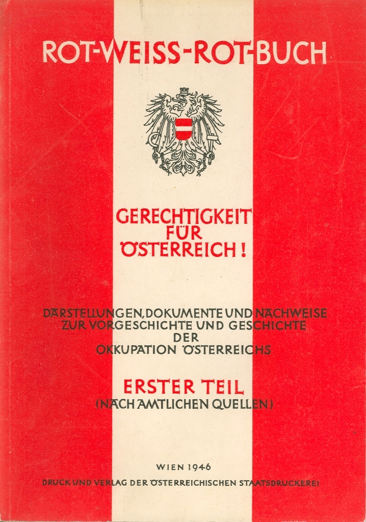 Cover of the book "Rot-Weiß-Rot-Buch, Gerechtigkeit für Österreich! Darstellungen, Dokumente und Nachweise zur Vorgeschichte und Geschichte der Okkupation Österreichs (nach amtlichen Quellen), Österreichische Staatsdruckerei, Wien 1946", also published in an English version one month later as "Red-White-Red-Book. Justice for Austria. Descriptions, Documents and Proofs to the antecedents and history of the occupation of Austria. First Part (from official sources), Austrian State Printing House, Vienna, 1947".